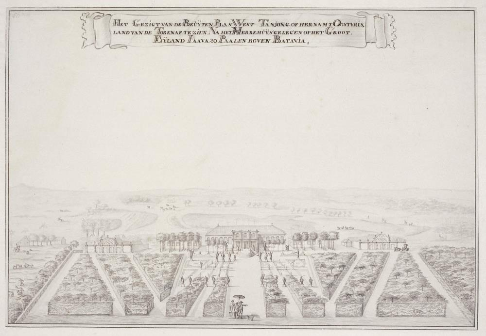 Gezicht vanaf de toren van landgoed Tanjong West (Barat), ook wel genoemd Oostvriesland. Het landgoed was destijds in bezit van Jan Andries Duurkoop, die een kudde van 5000 stuks vee had en melkproducten leverde aan de Compagnie. De toren, die 25 meter hoog was, fungeerde als toegangspoort tot landgoed Tanjong West, 30 kilometer ten zuiden van Batavia. De reis van Batavia naar Tanjong West duurde, stroomopwaarts de rivier de Ciliwung, 48 uur, stroomafwaarts 6 uur.